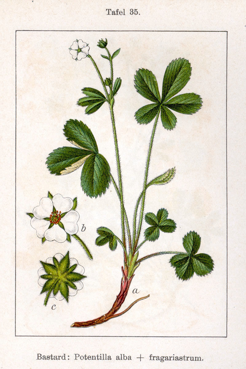 Potentilla x hybrida Wallr. (Potentilla alba x P. sterilis) Original Description Bastard: Potentilla alba x fragariastrum